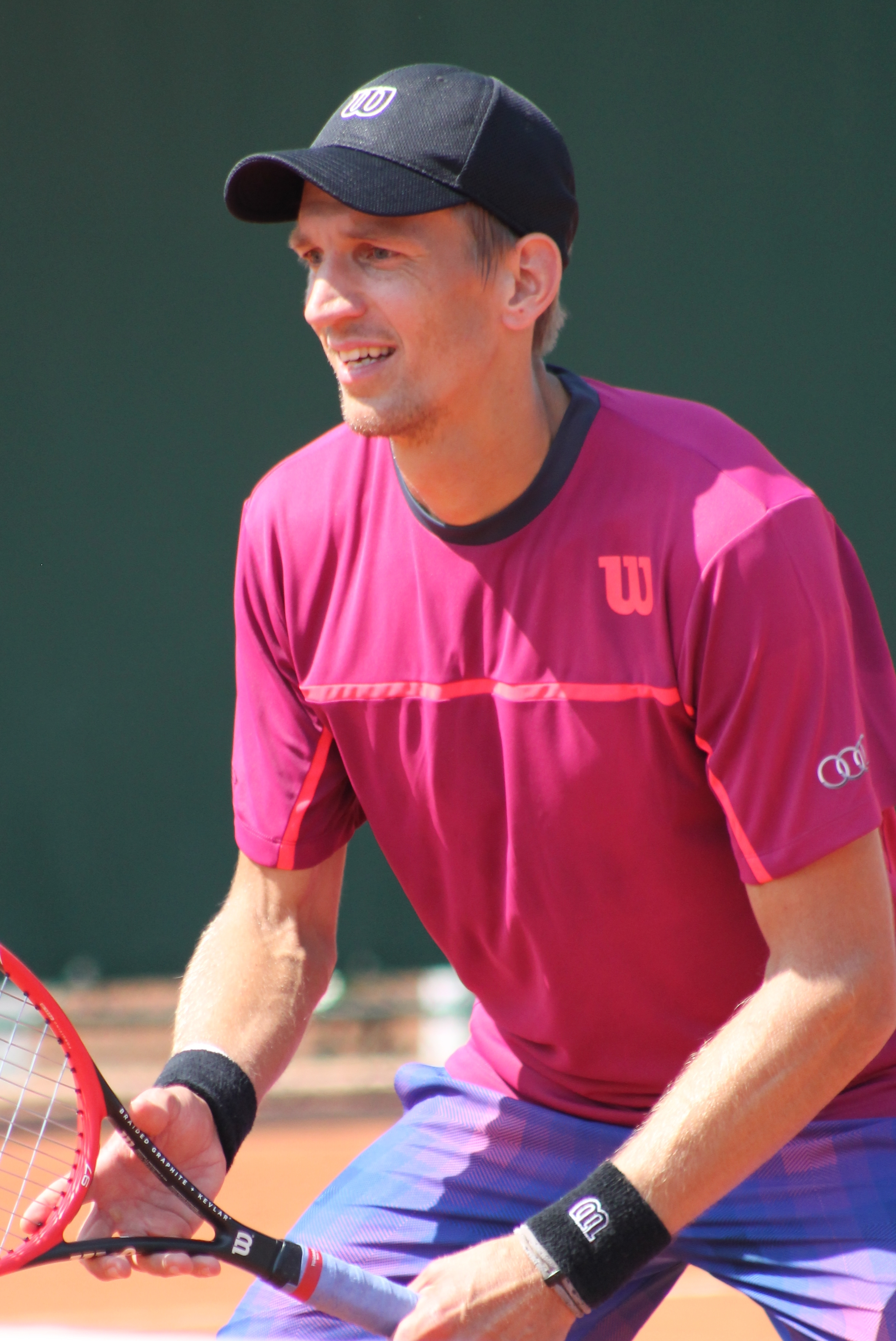 Nieminen RG15 (5)